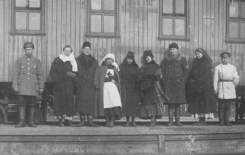 „Ühistöö“ meditsiini- ja toitluspunkti personal Vastseliina (Lepassaare raudteejaamas). Vasakult kolmas 2.diviisi sidumissalga nooremarst Arthur Amon, paremalt kolmas [punkti juhataja sõjaväeametnik Artur] Klimberg.